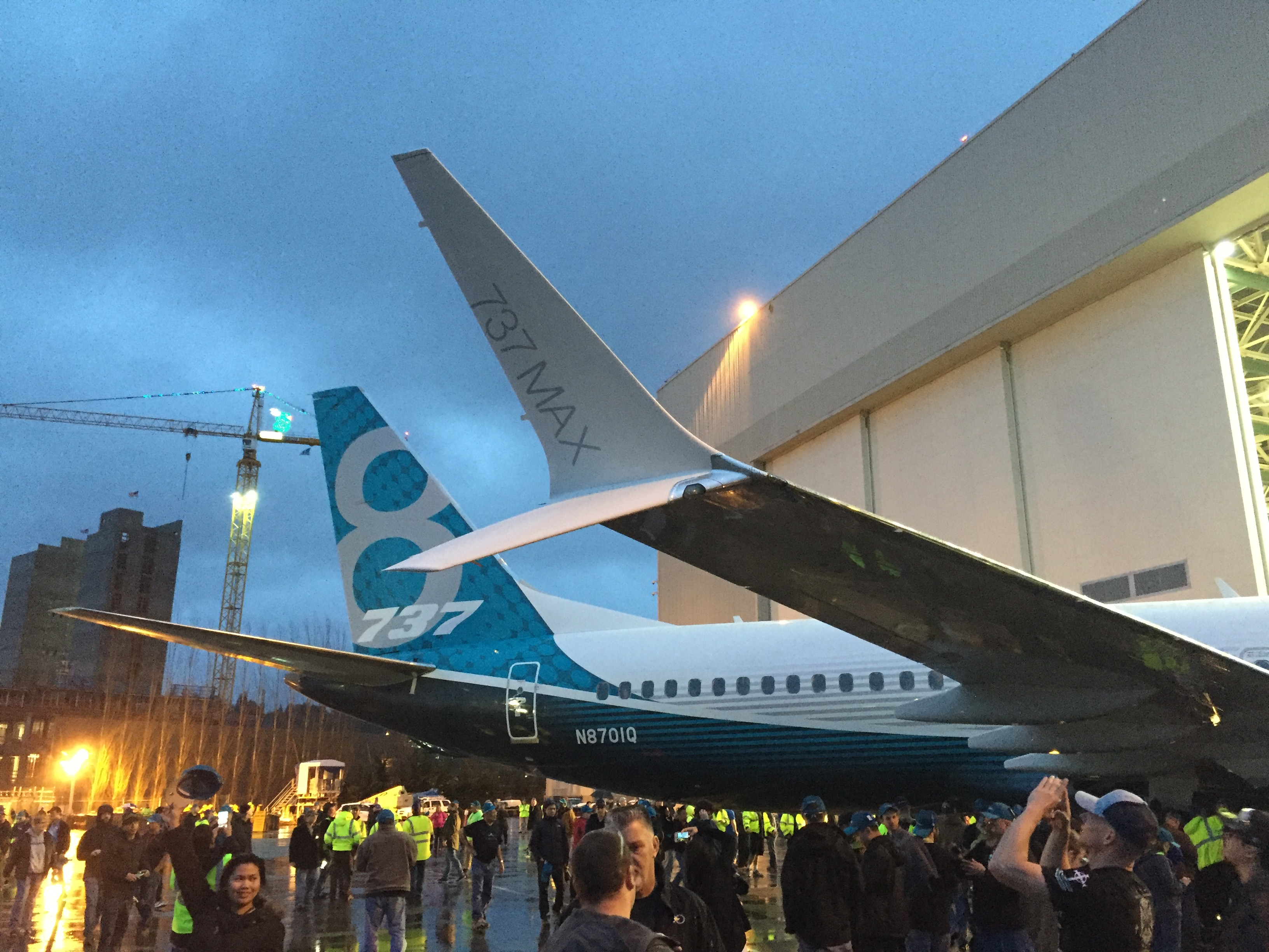 Boeing 737 MAX